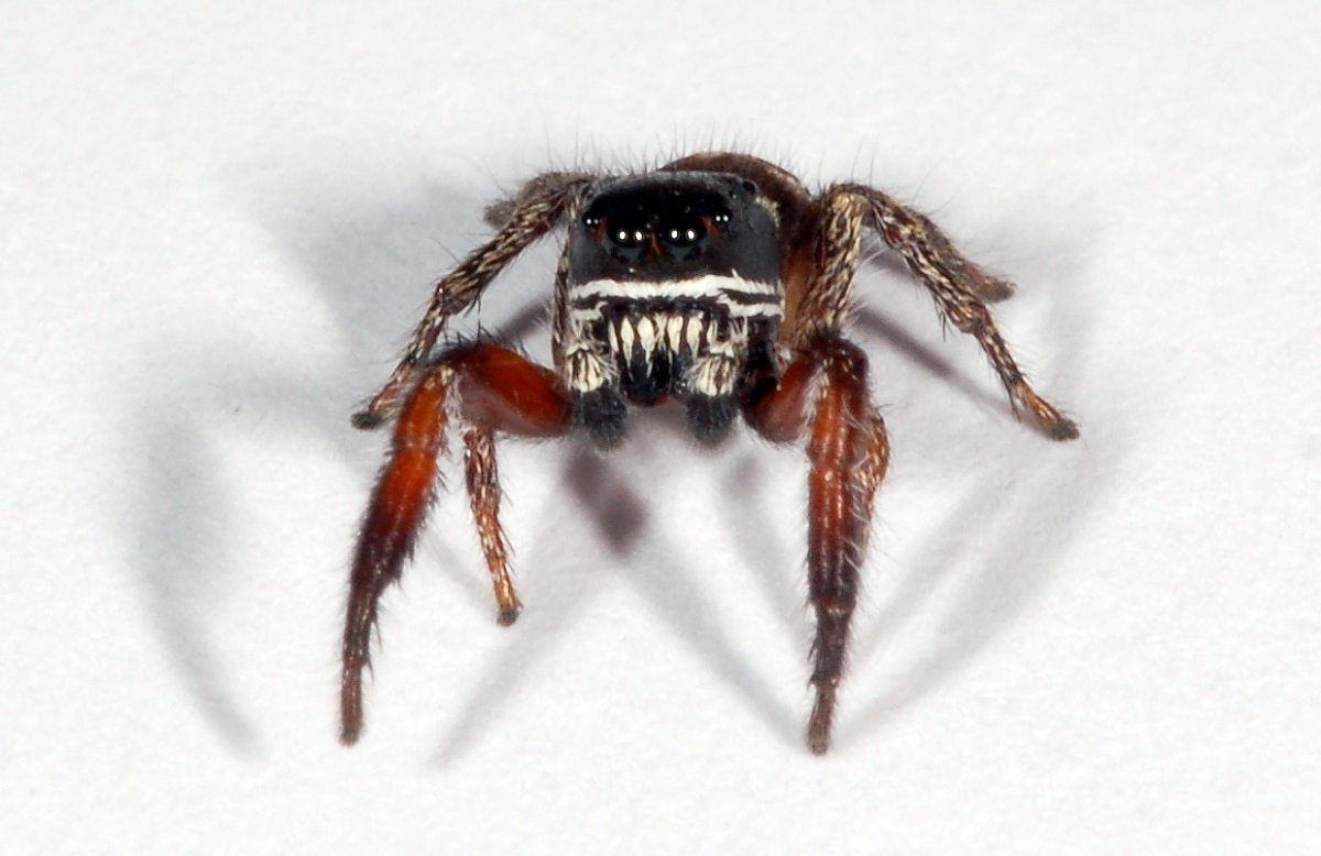 Salticidae, Pellenes nigrociliatus, Eberstädter Düne, Darmstadt, Hessen, Deutschland